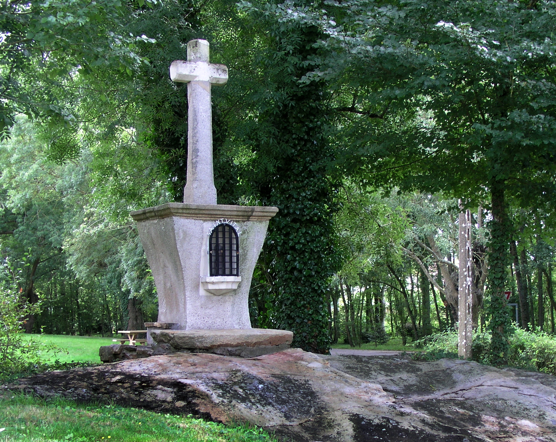 La pierre Cantin est surmontée d'une croix en pierre (1845) dédiée à saint Vital, Saint-Viaud, Loire-Atlantique, France.